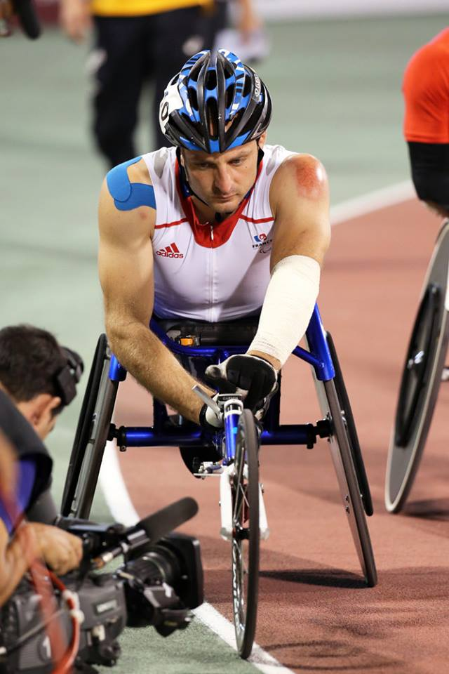 Julien Casoli aux championnats du monde d'athlétisme handisport 2015 à Doha